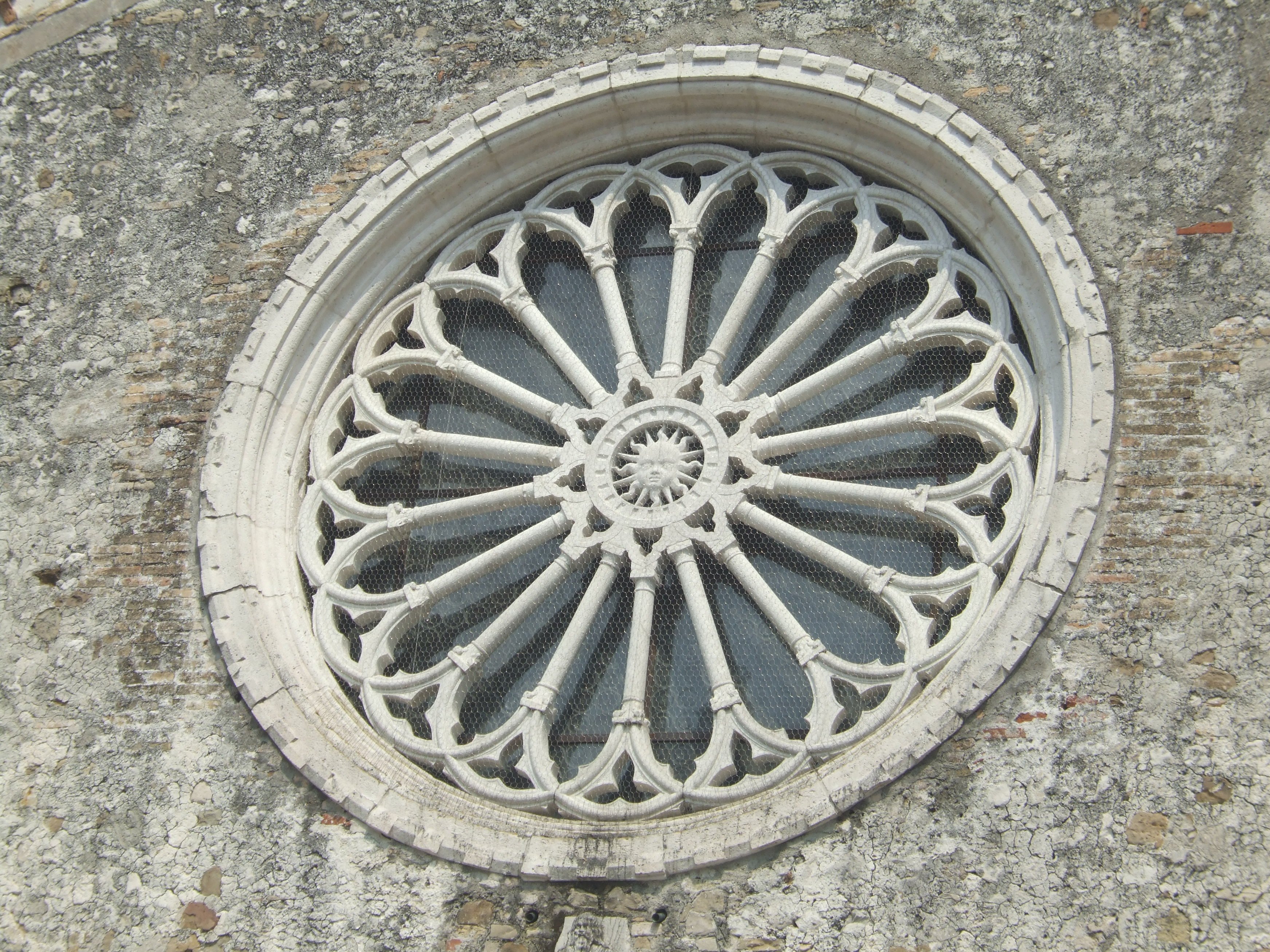 Duomo di Maniago - Rosone Centrale